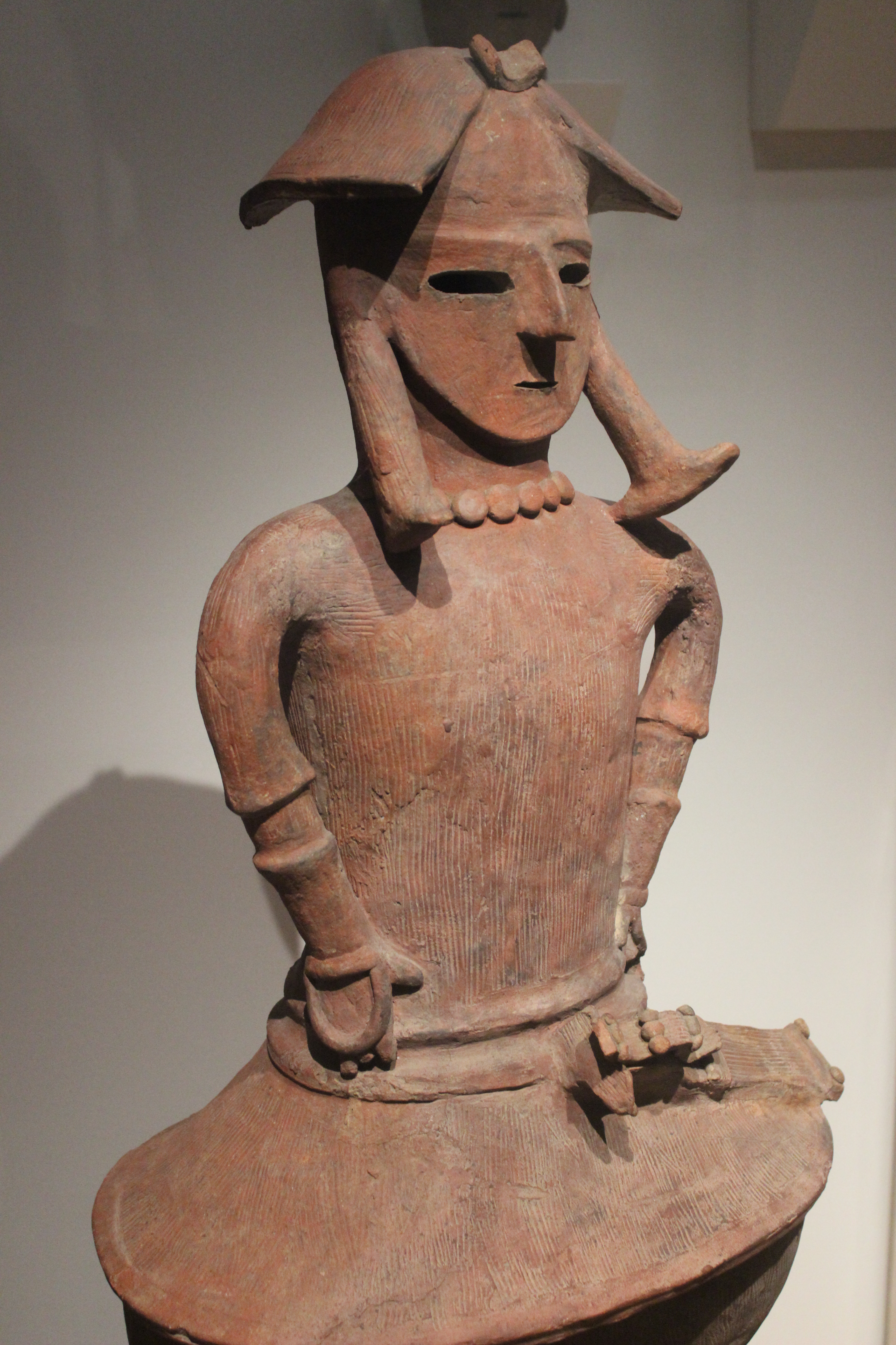 París, Musée Guimet. Haniwa.